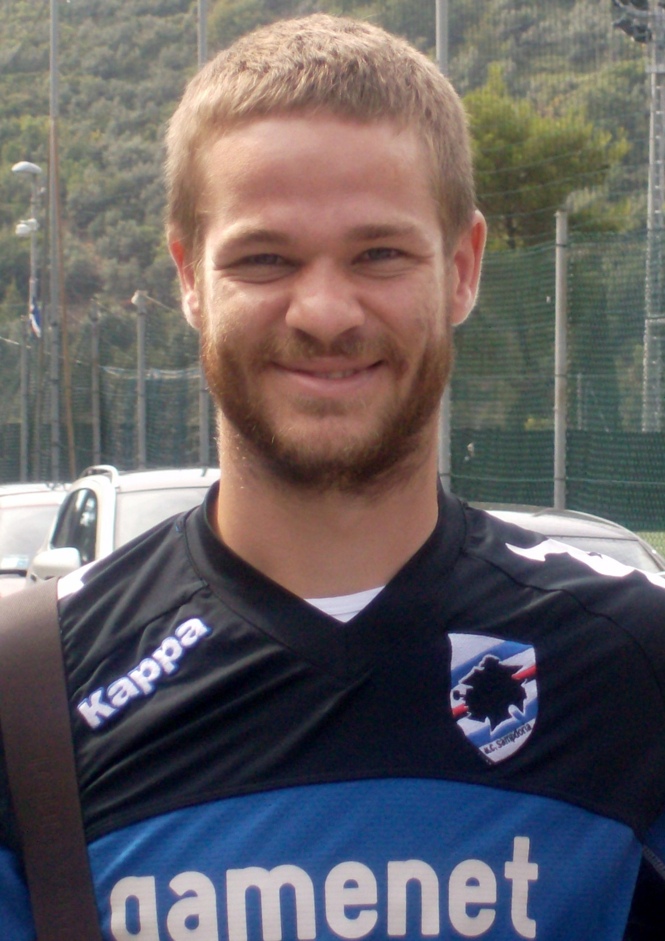 Rossini al Mugnaini